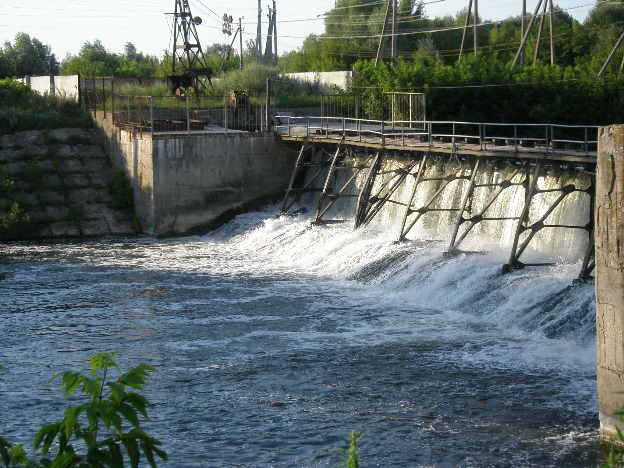 Низівська ГЕС: Вид на греблю Низівської ГЕС